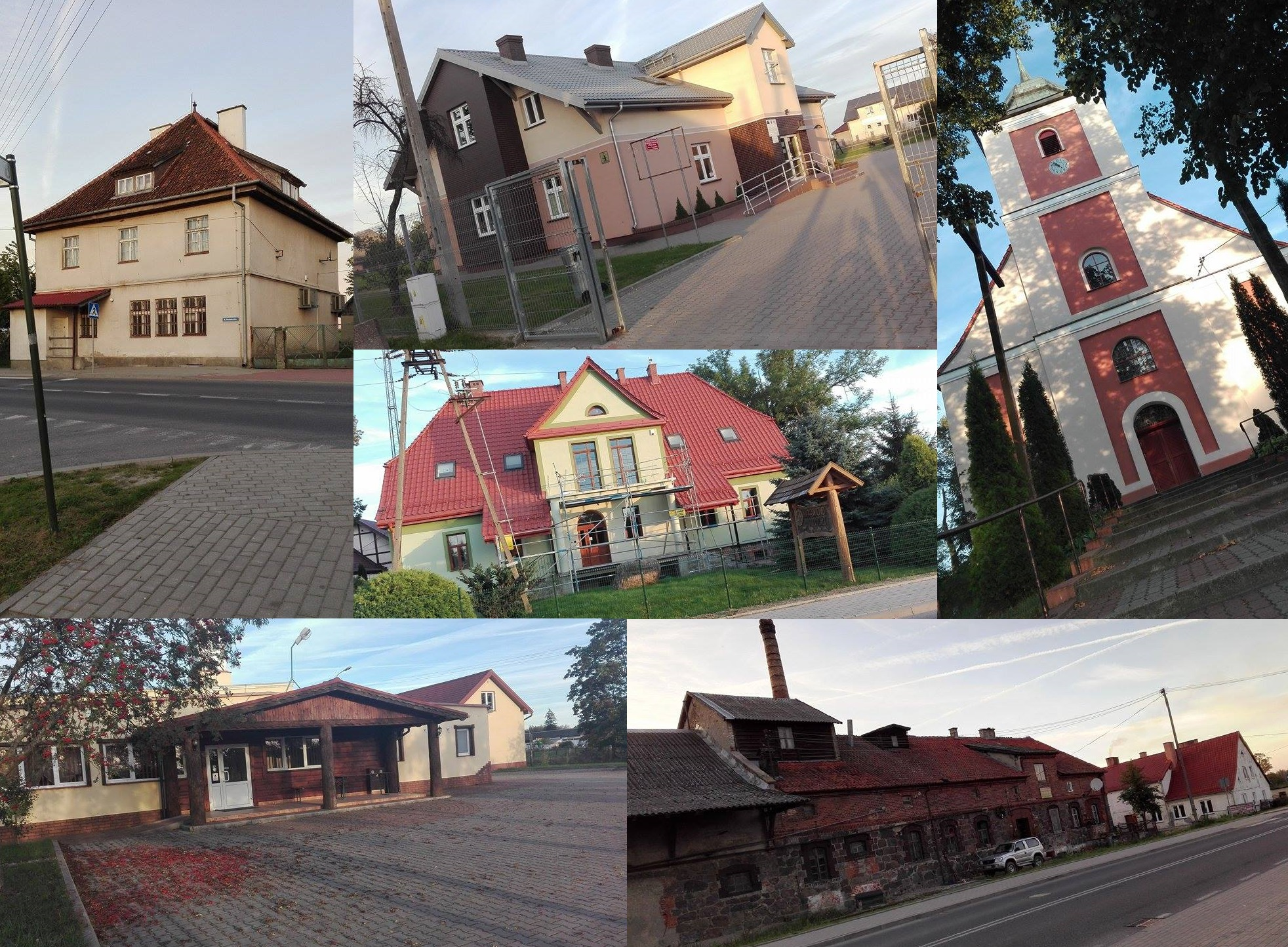 poczta, sck, nadlesnictwo, kosciol, zajazd, gorzelnia